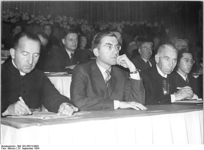 Zentralbild-TBD-Wlocka 2462 Zi-Ho. 10 Motive 23.9.1954 7. Parteitag der CDU in Weimar - 21. bis 25.9.1954 Am Mittwoch, den 22.9.1954, wurde in der Weimarhalle in Weimar, der 7. Parteitag der CDU unter Teilnahme zahlreicher Delegationen aus den volksdemokratischen Ländern und dem kapitalistischen Ausland eröffnet. UBz: (v.l.n.r.) Prof. Dr. St. Huet, General-Vicar von Krakau (Polen), das Mitglied des Weltfriedensrates, Universitäts-Professor Dr. Heinrich Brandweiner (Oesterreich) und der evangelische Bischofs-Vicar Alfred Herrmann (Rumänien).